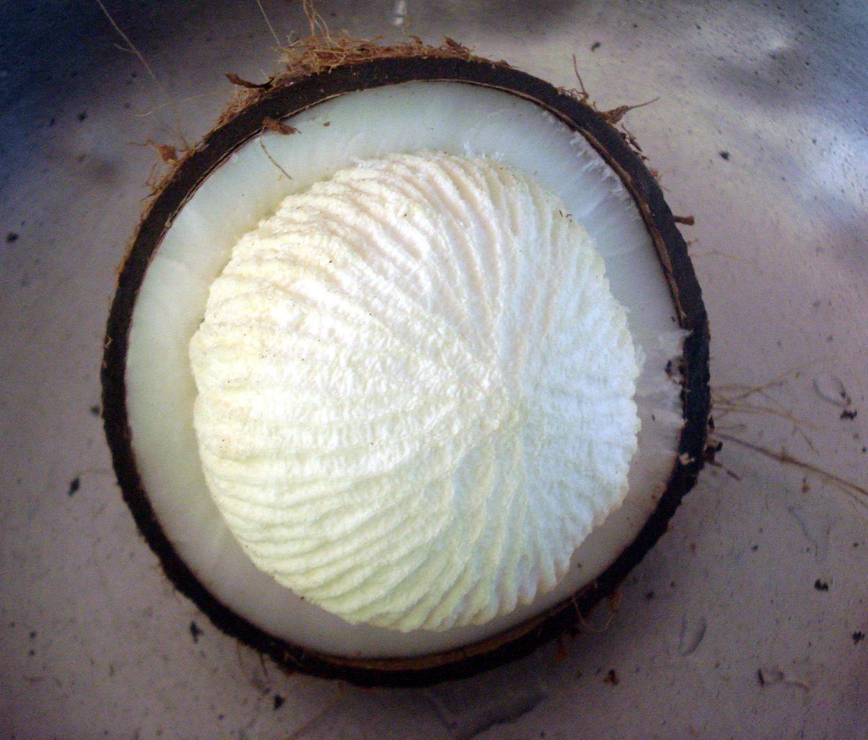 മുളച്ച തെങ്ങയുടെ ഉൾവശത്തുള്ള പൊങ്ങ്, തിന്നാൻ രുചിയുള്ളതാണ്.